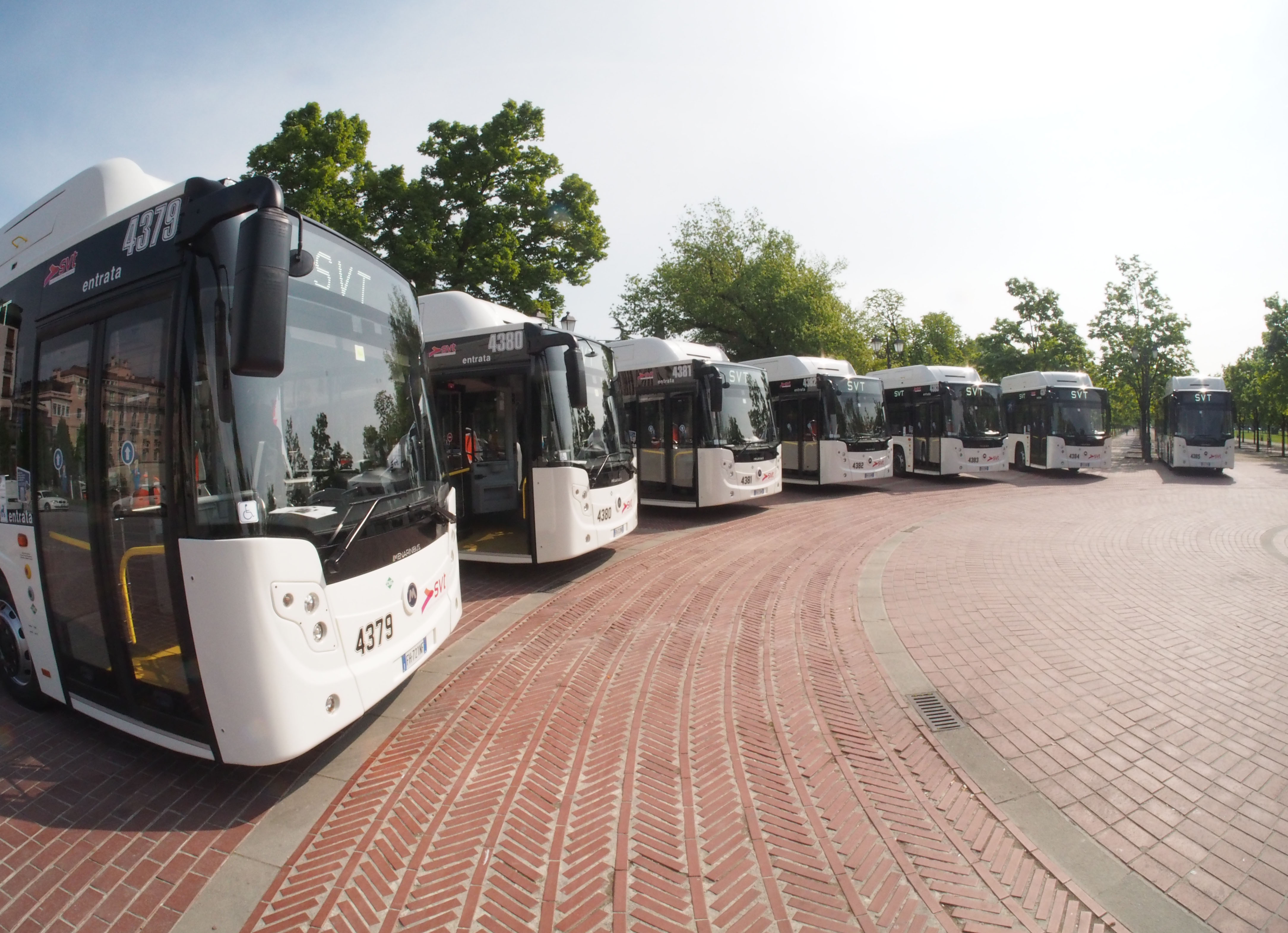 I nuovi 7 mezzi sono stati presentati nella mattinata del 13 aprile 2017 in Campo Marzio (foto del Comune di Vicenza)